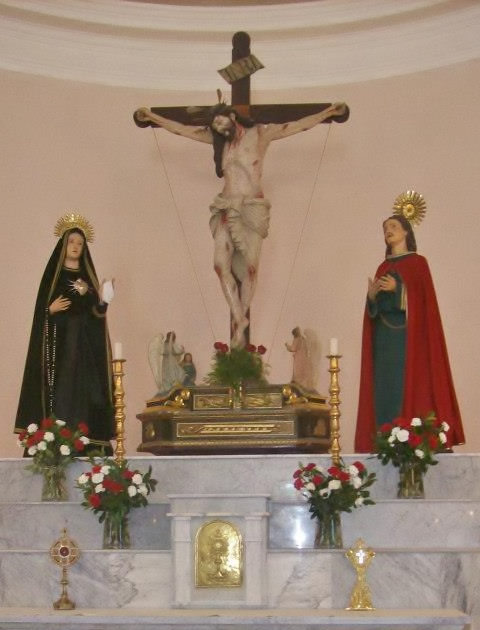 Cristo de la Buena Muerte de Villa Reducción, obra atribuida a Esteban Sampzon